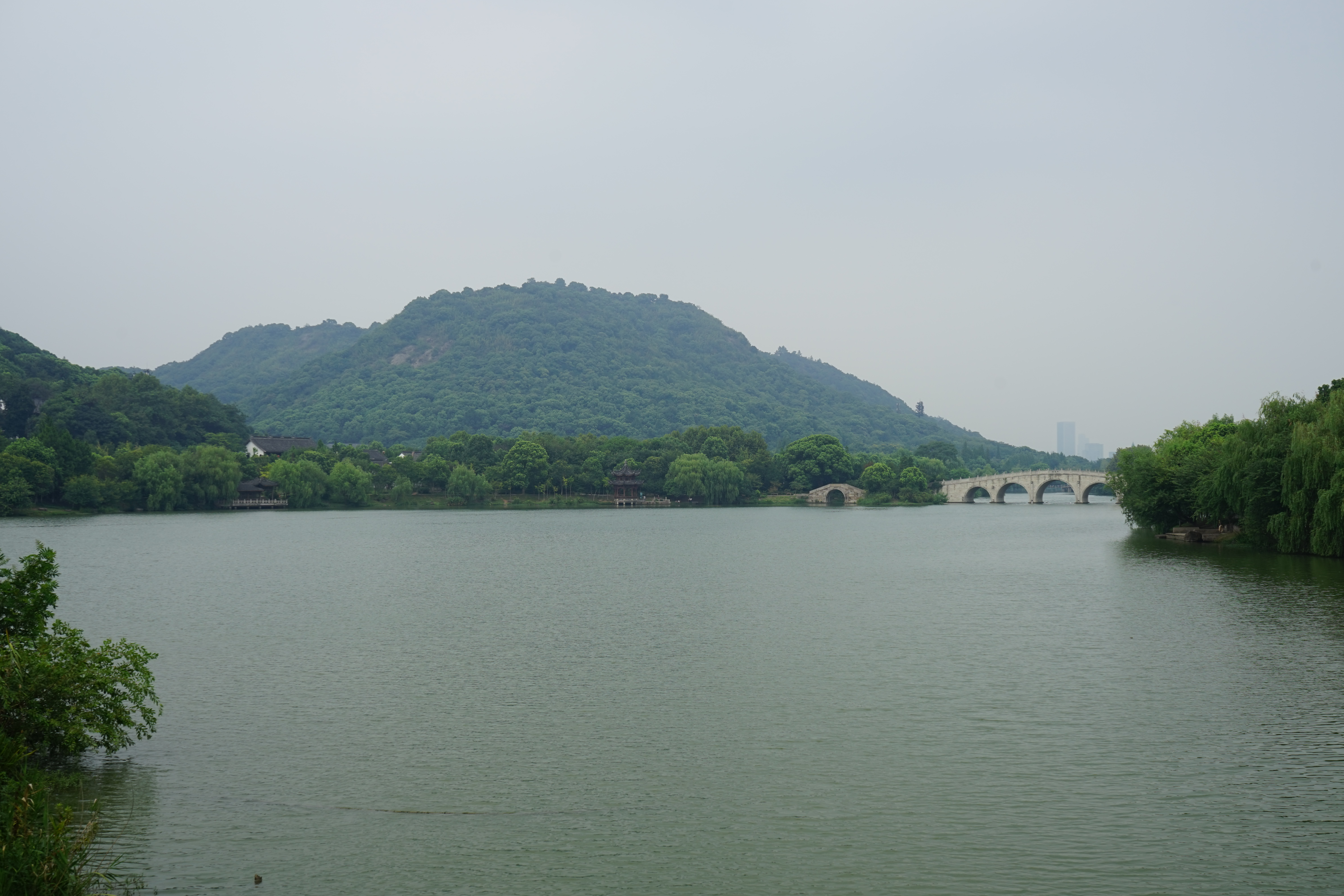 从启明桥上看湘湖。照片中可见象山Xiang Mountain, 山脚窑烟Shanjiaoyaoyan, 如意亭Ruyi Pavilion, 跨湖桥Kuahu Bridge.